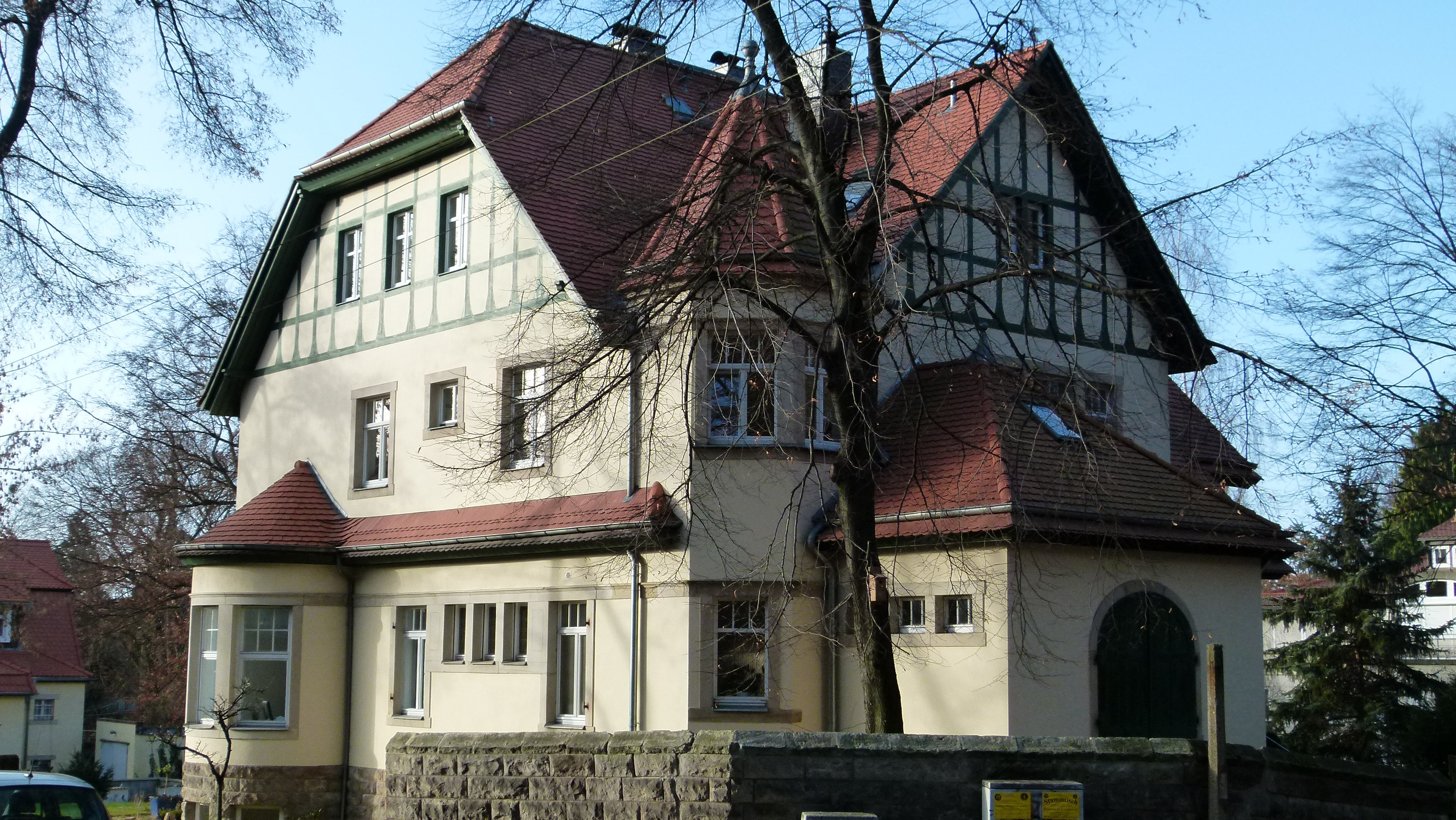 Denkmalgeschütztes Haus, Wunderlichstraße 3, Loschwitz, Dresden